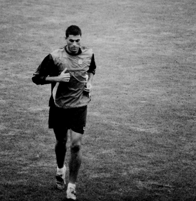 Diego Tristán, en Abegondo, Galiza. Deportivo de La Coruña